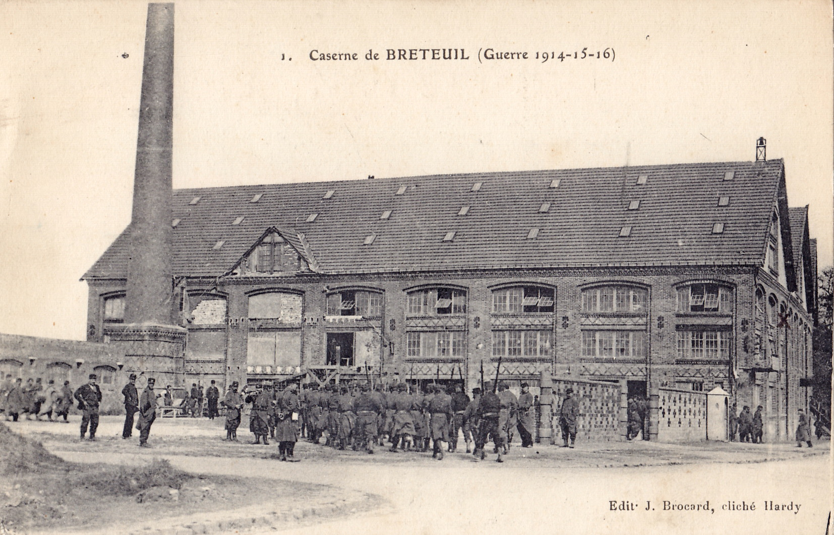 Carte postale ancienne éditée par Brocard, cliché Hardy, n°12 : Caserne de BRETEUIL (Guerre 1914-15-16) Usine de Breteuil transformée en caserne militaire française en 1916